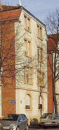 Ausschnitt aus unten genannter Quelle